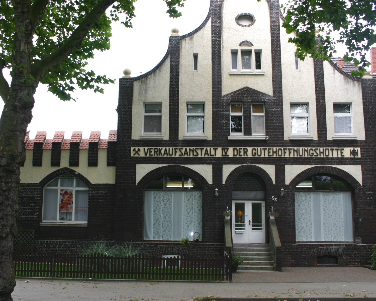 Ehemalige GHH-Verkaufsanstalt der Siedlung Vondern (Oberhausen-Osterfeld)